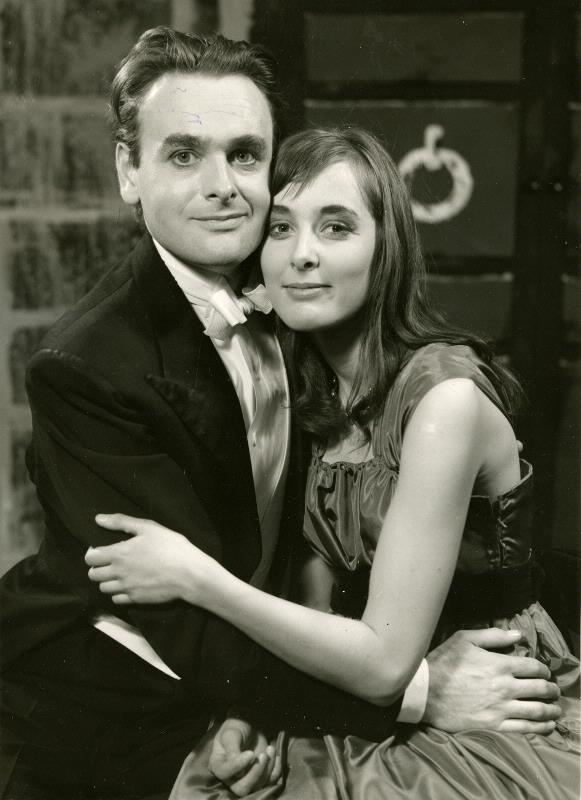 Bertil Karlsson och Ulla Sundberg i Romanoff och Julia på Helsingborgs stadsteater